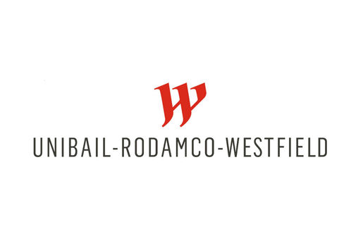 Logo de Unibail-Rodamco-Westfield